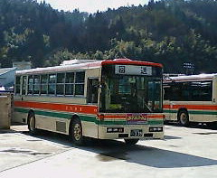 全但バス(兵庫県養父市)に転入したいすゞ・キュービック(富士重工業製車体車)